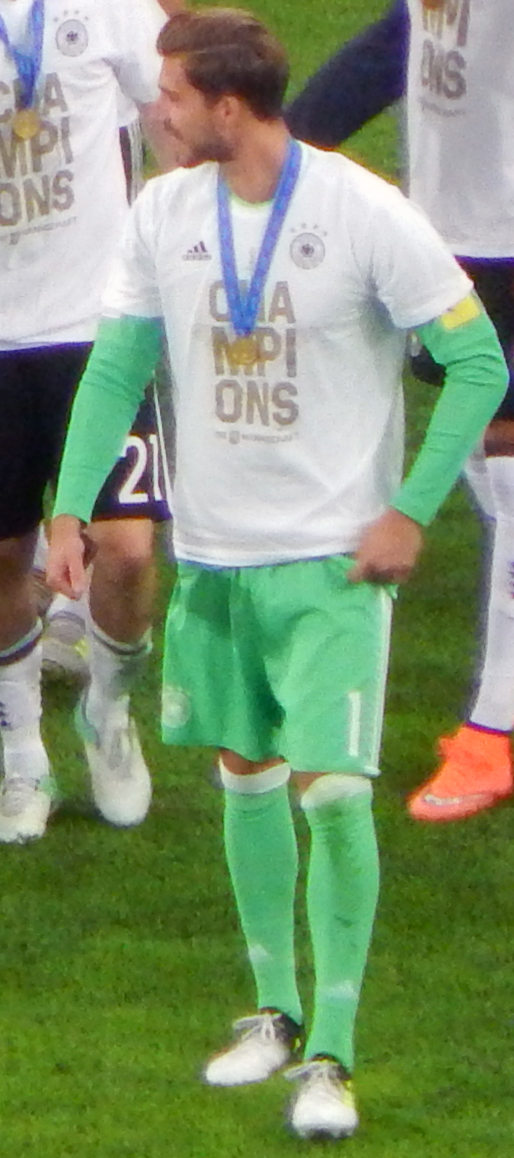 Финал Кубка конфедераций 2017